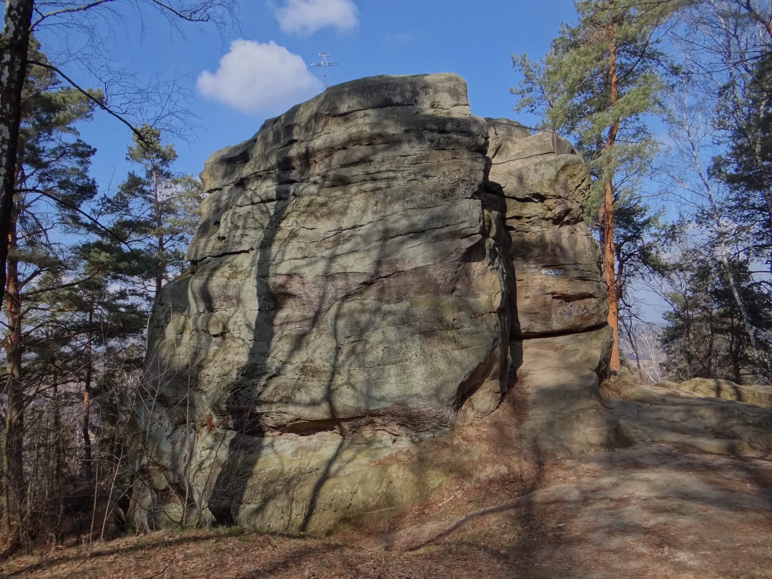 Skałka z krzyżem w rezerwacie przyrody Skamieniałe Miasto w Ciężkowicach